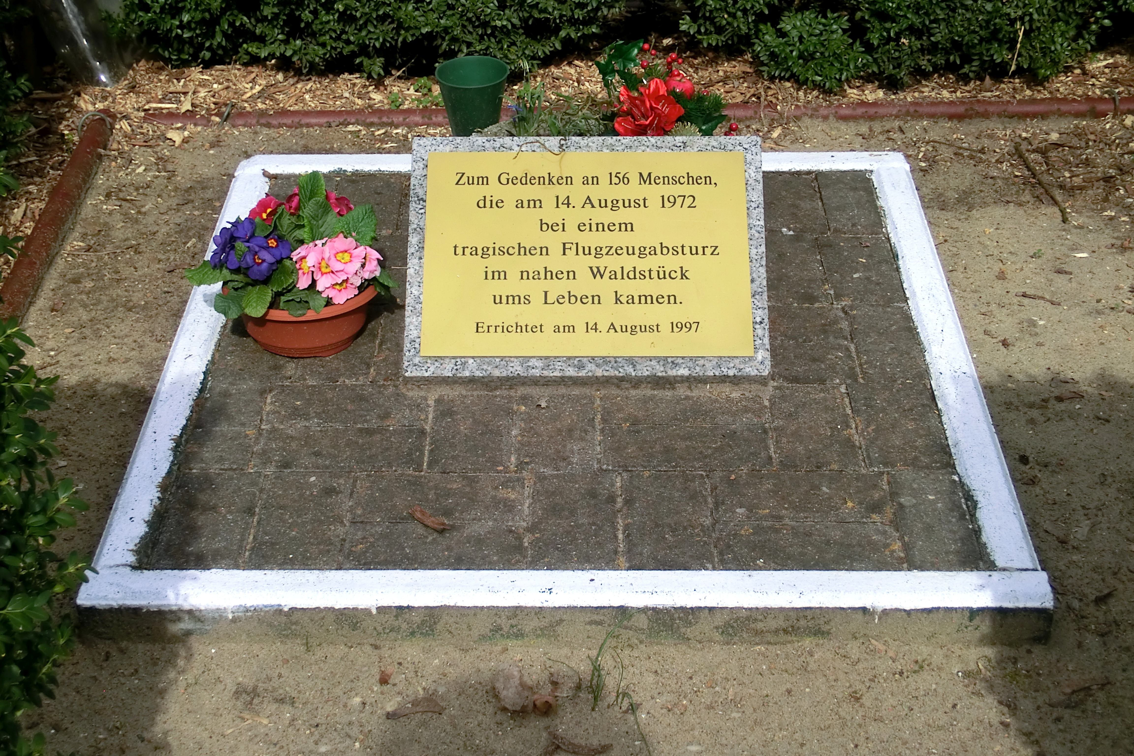 Gedenktafel für die Opfer des Flugzeugunglücks vom 14. August 1972 in Königs Wusterhausen